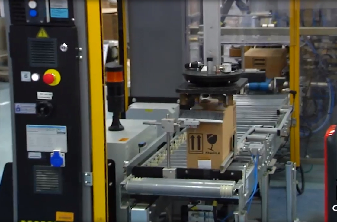 GSK cumple 40 años en Aranda de Duero.